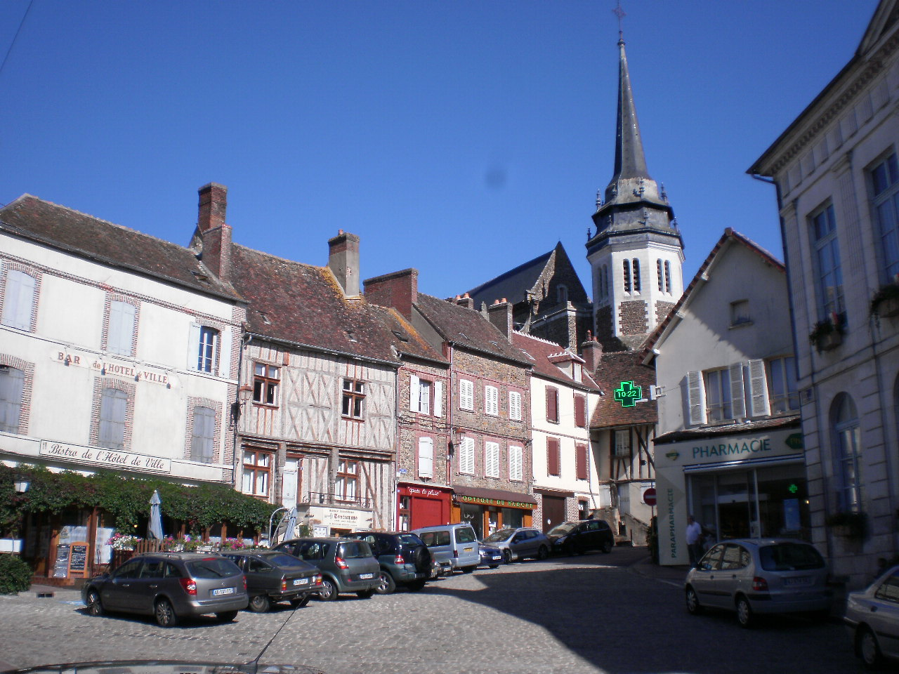 Toucy place Hôtel de ville